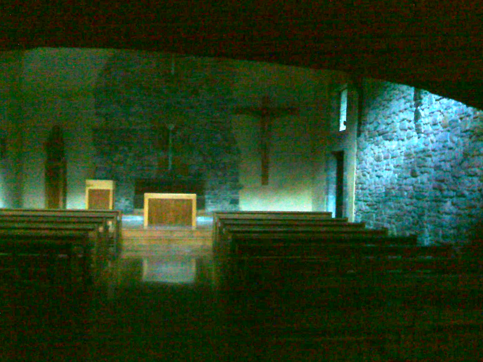 Iglesia de San Andrés de Astigarribia de Motrico Guipuzcoa, País Vasco (España)